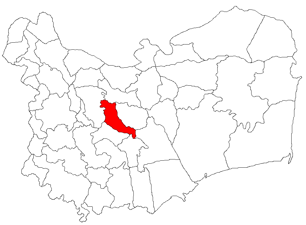 Categorie:Hărţi ale judeţului Tulcea